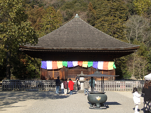 国宝 白水阿弥陀堂（福島県いわき市） 撮影者-Wiiii 撮影日-2006年1月3日